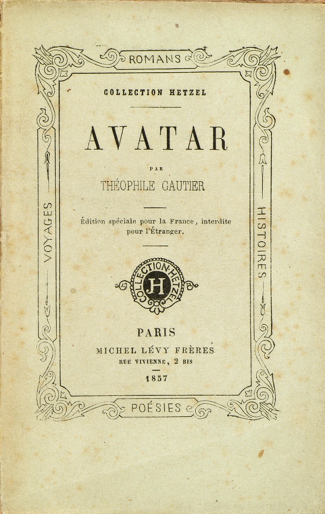 Frontispício da edição em livro de "Avatar", em 1857.